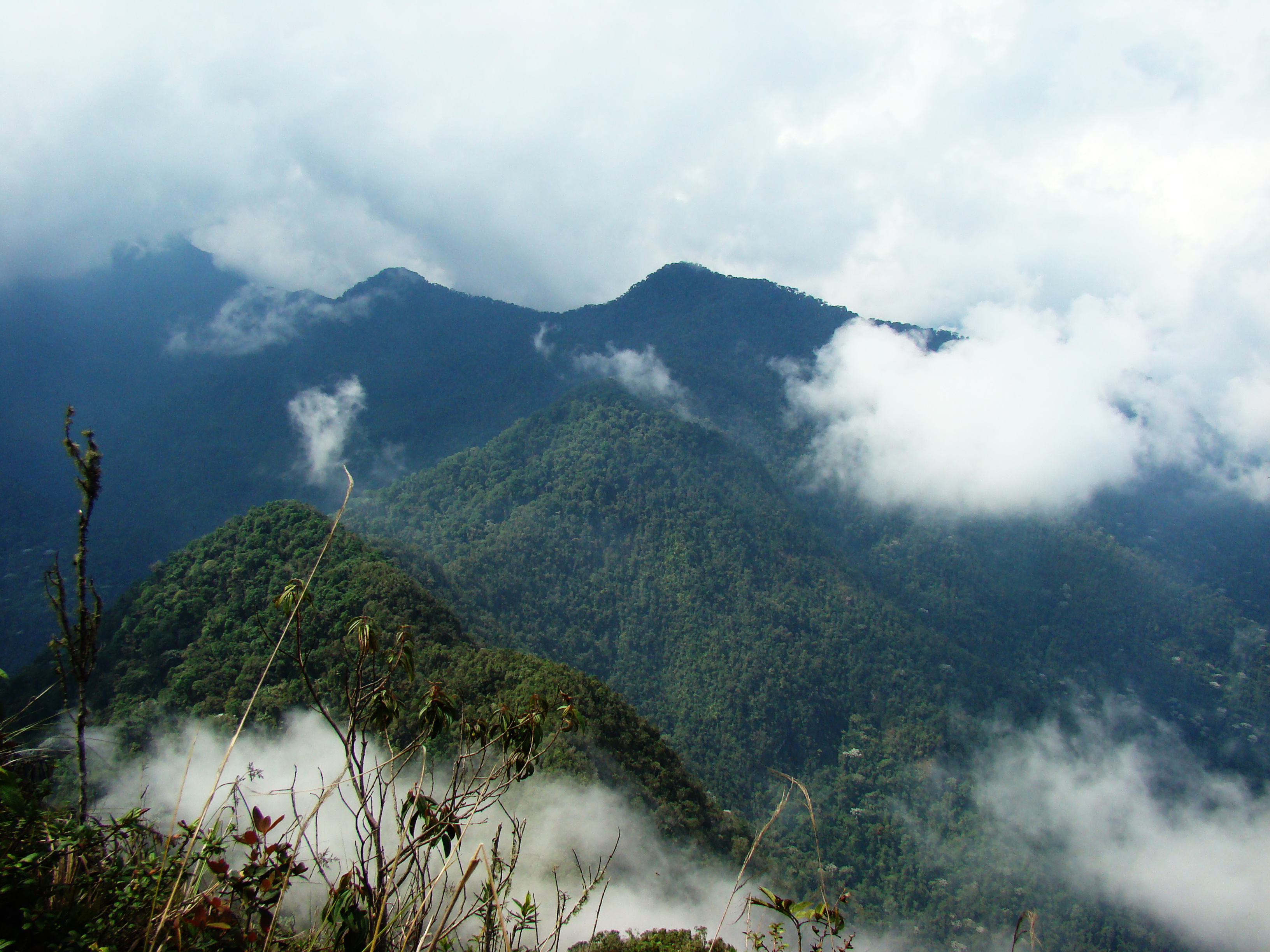 Pico de Loro en el PNN Farallones de Cali